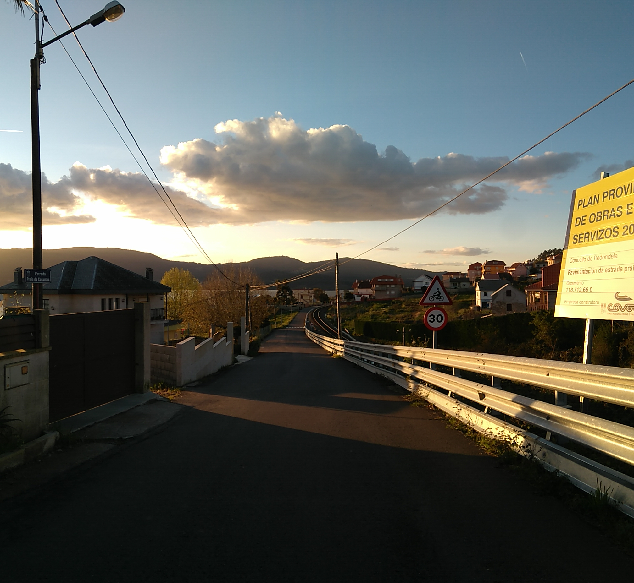 Estrada de San Pedro, Cesantes, Redondela..